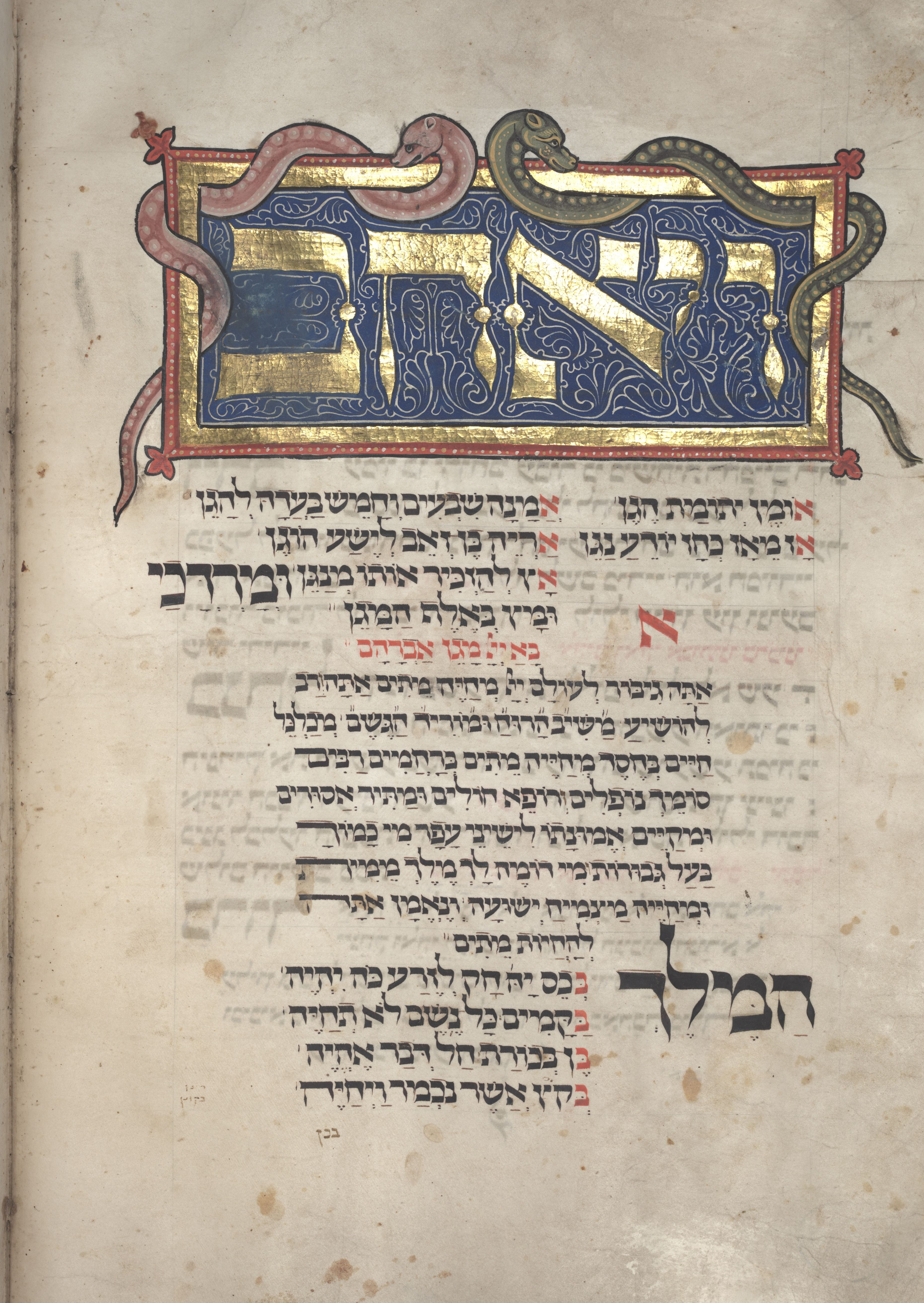 תחילת הקרובה לפורים 'ויאהב אומן', מאת רבי אלעזר בירבי קליר, מתוך מחזור ליפסיא (לייפציג Ms. 1102), עמוד 46ב, כותרת מעוטרת בזהב ובציורי נחשים